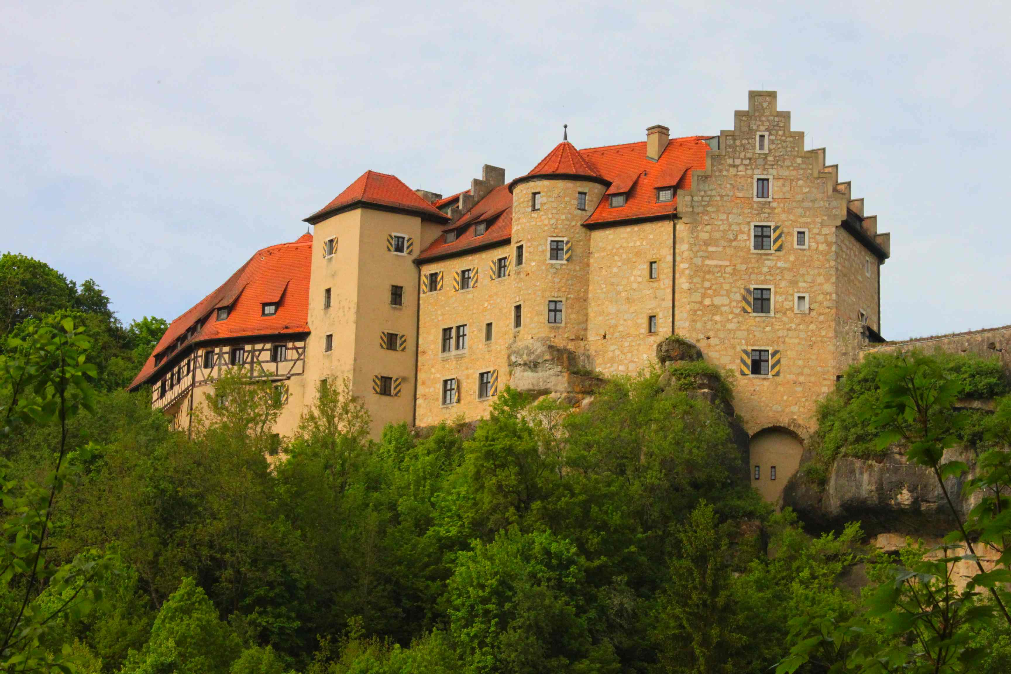 Die Burg Rabenstein thront über dem Ailsbachtal, sie wird heute als Hotel genutzt